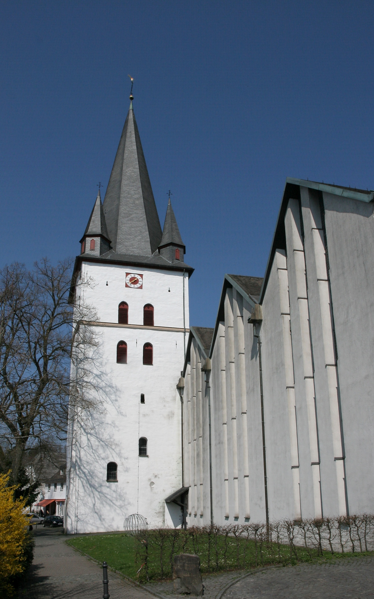 St.-Clemens-Pfarrkirche in Drolshagen. This image shows a heritage building in Germany, located in the North Rhine-Westphalian city Drolshagen (no. 1).